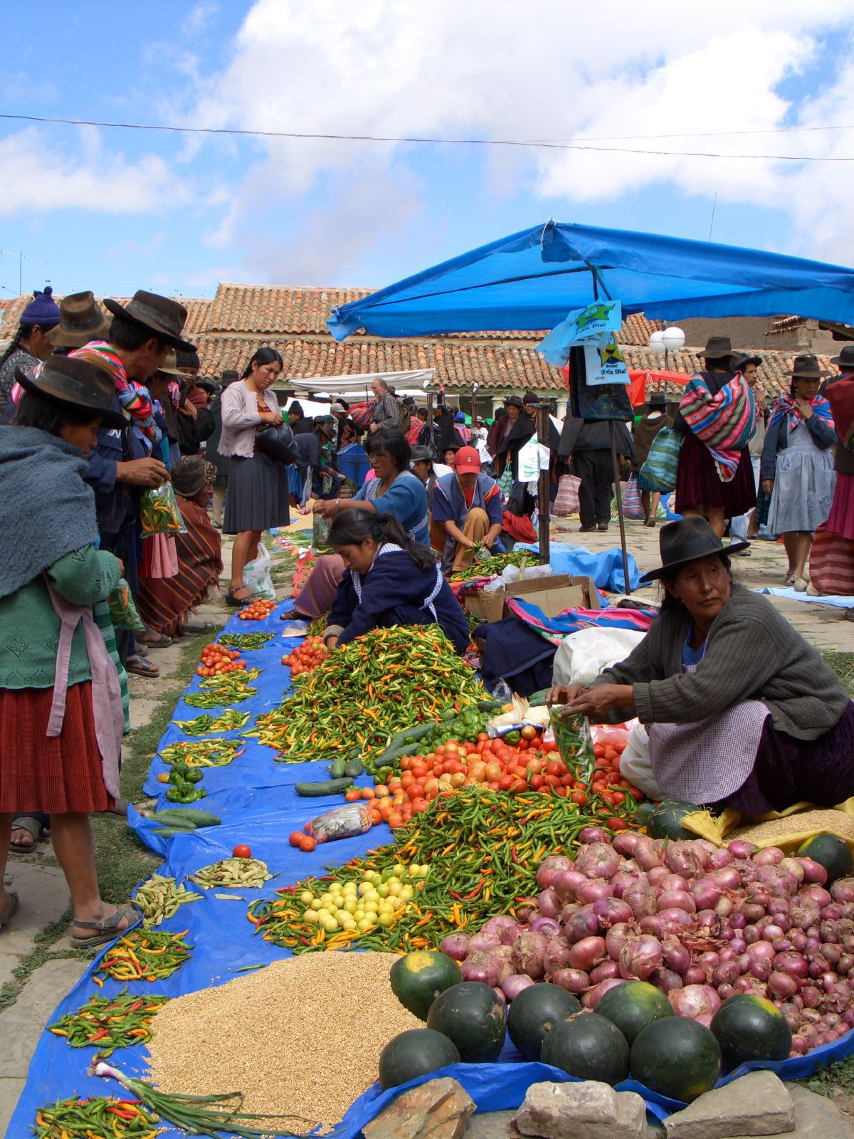 Market in Tarabuco